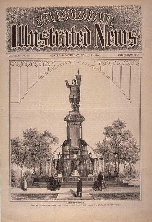 Impression - Illustration d'un projet non réalisé du monument de Maisonneuve, Place d'Armes. Encre sur papier - Photolithographie. This image is from the Canadian Illustrated News, 1869-1883, held in the Library and Archives Canada under record 4071